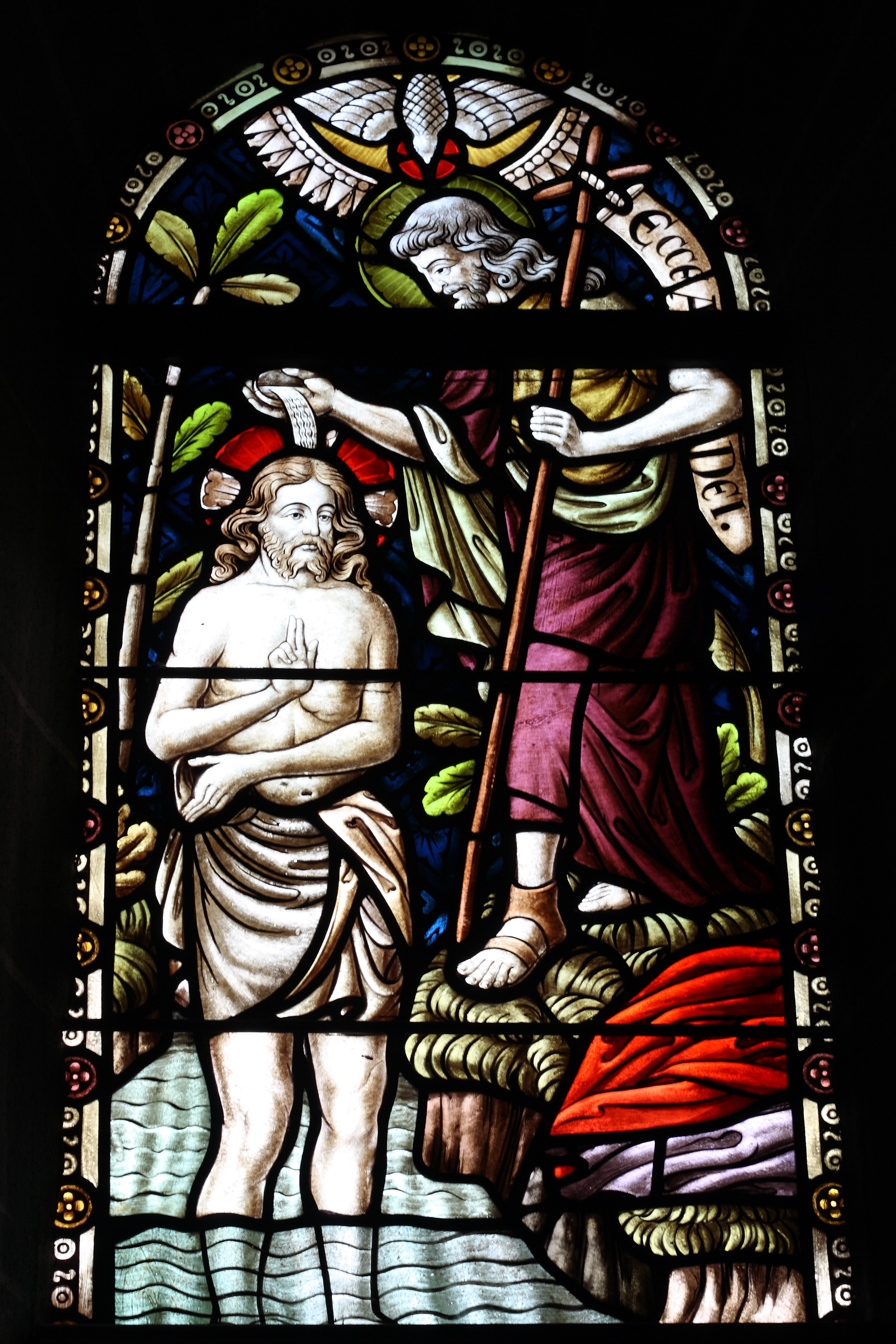 Bleiglasfenster (Taufkapelle) in der katholischen Pfarrkirche St. Pankratius in Kaisersesch, Darstellung: Taufe Jesu durch Johannes den Täufer, Entwurf: ?, Ausführung: Glasmalerei Wilhelm Heinrich Jansen, 1903-1912 (siehe LI-PEN YU: Die Glasmalerei in Trier 1860-1930. Trier 2007, S. 447)